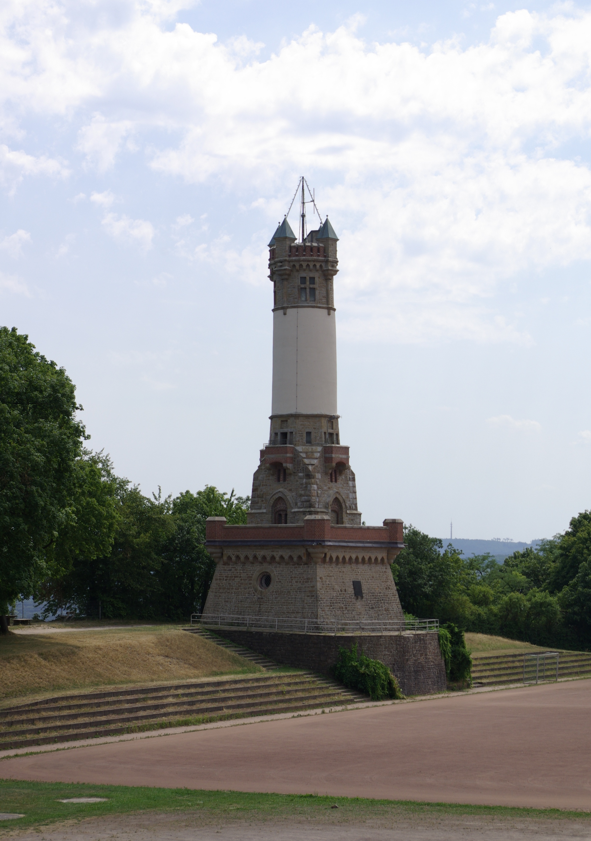 Harkortturm in Wetter an der Ruhr